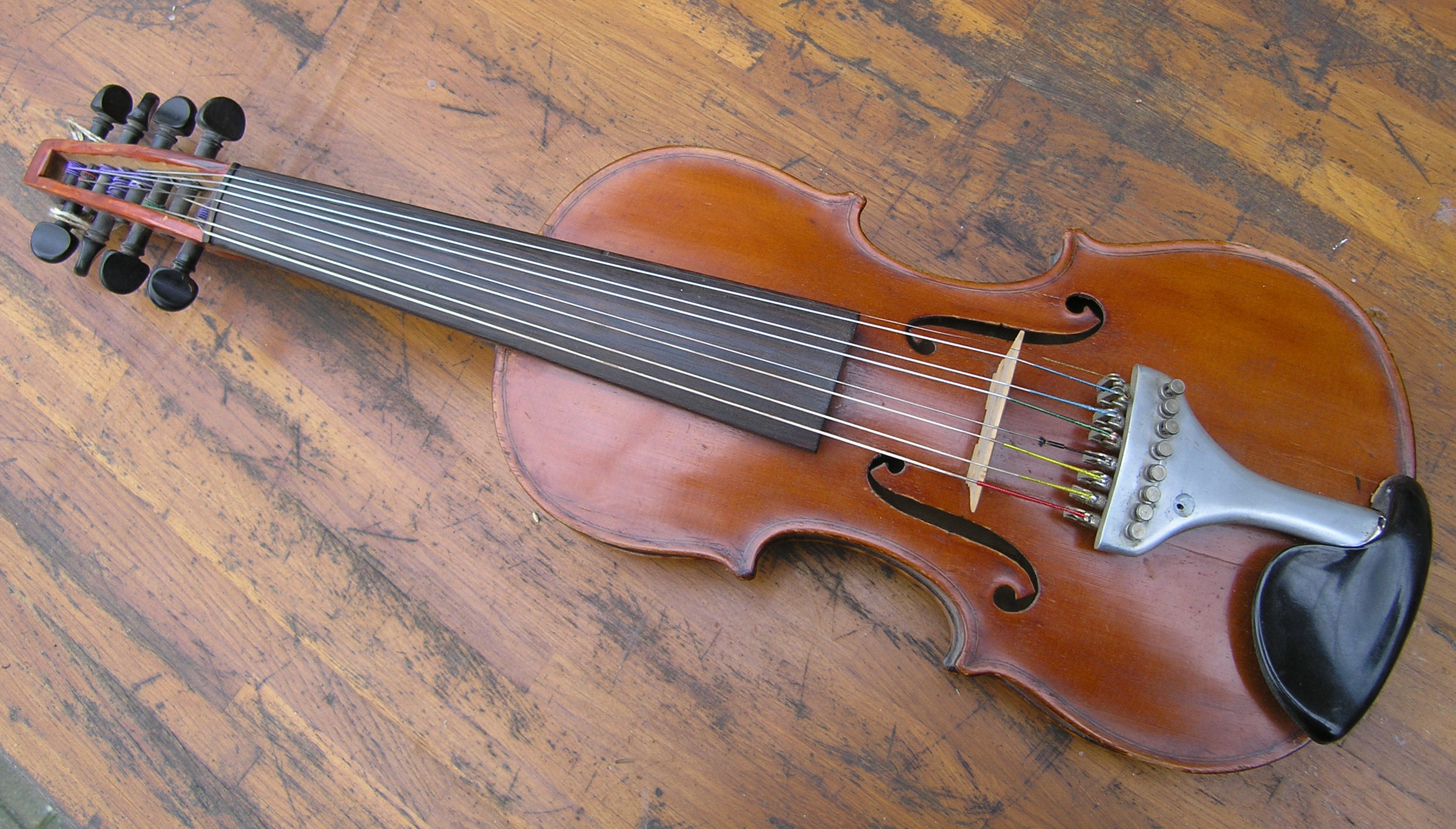 Viocta, a-snarige dubbeltoon viool. Octrooi: Willem Wolthuis